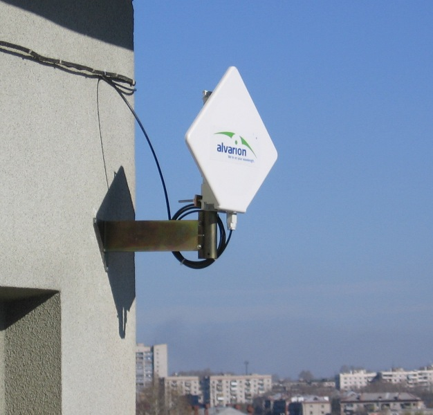 Alvarion CPE